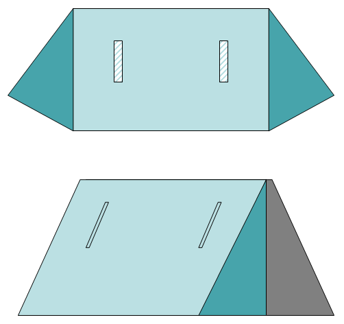 Schematics of a German Bundeswehr shelter half ("Zeltbahn")